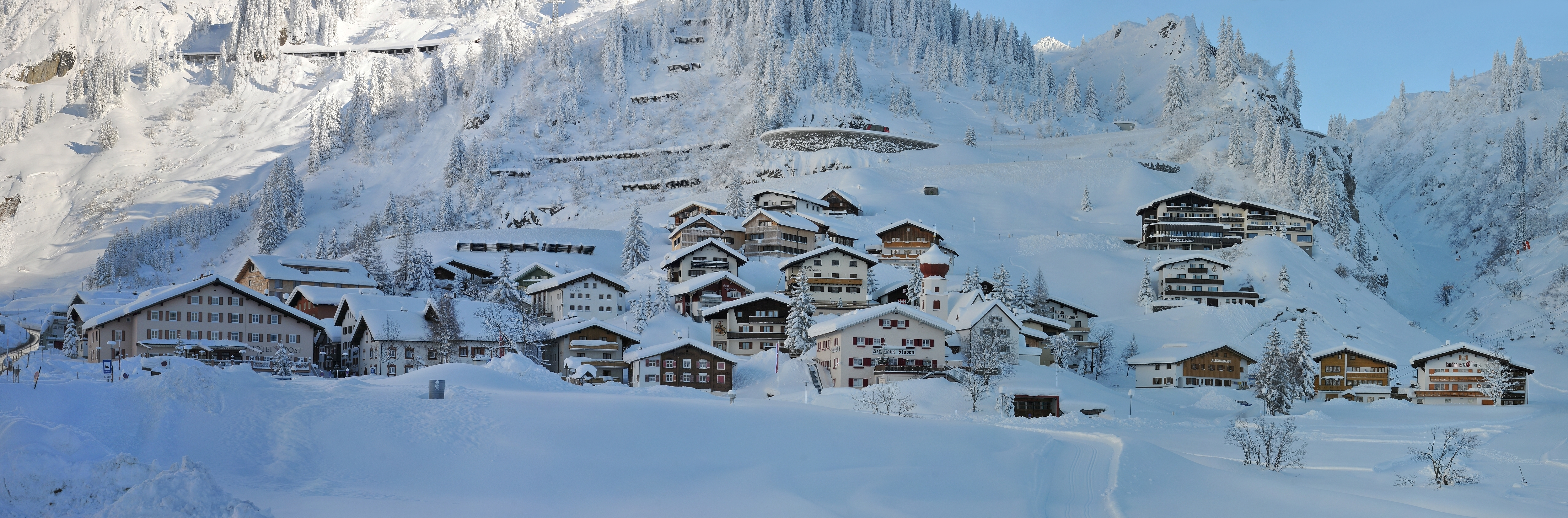 Stuben (Gemeinde Klösterle). NOTE: This image is a panorama consisting of multiple frames that were merged or stitched in software. As a result, this image necessarily underwent some form of digital manipulation. These manipulations may include blending, blurring, cloning, and colour and perspective adjustments. As a result of these adjustments, the image content may be slightly different from reality at the points where multiple images were combined. This manipulation is often required due to lens, perspective, and parallax distortions.